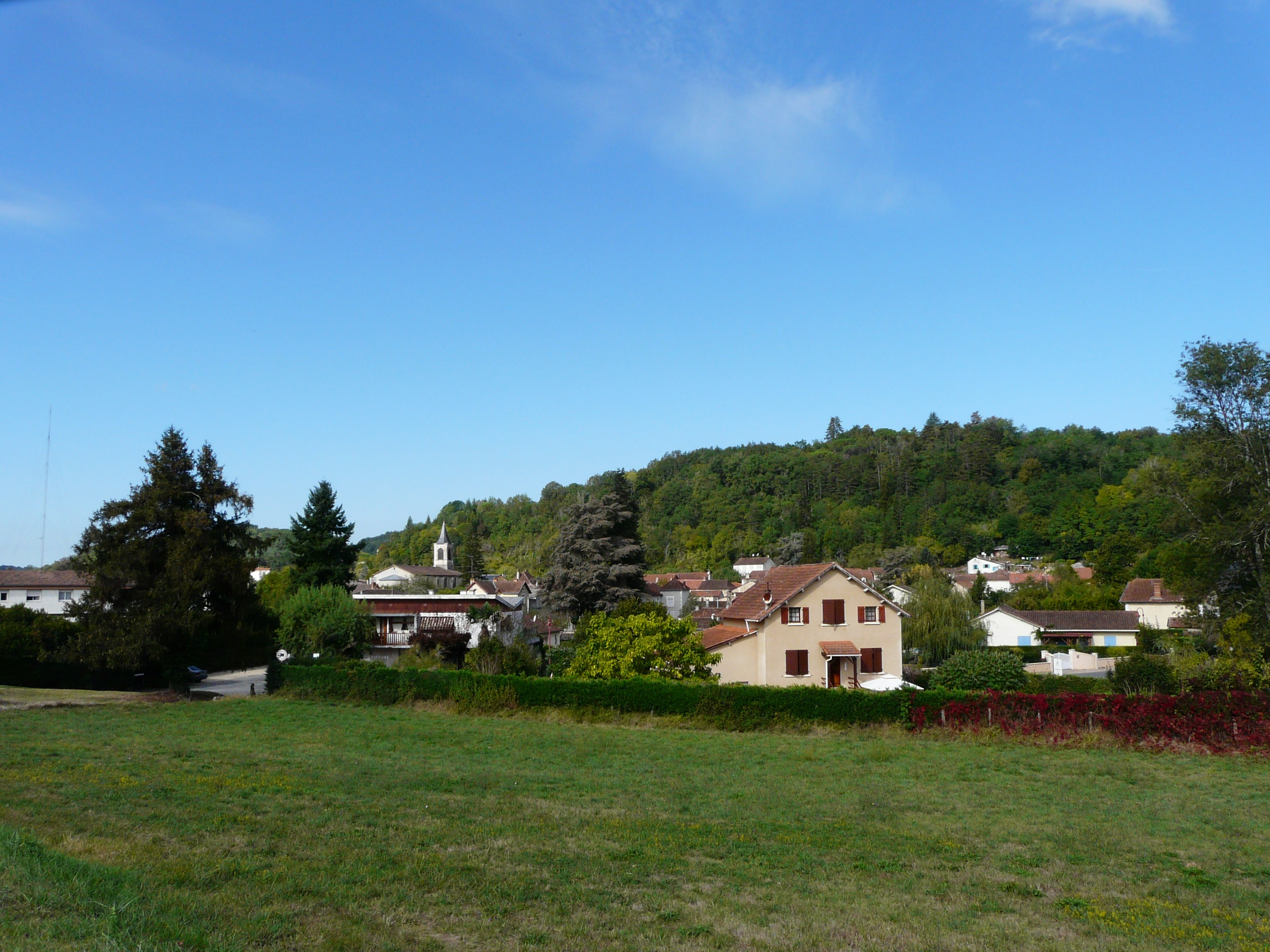 Le bourg de Vergt, Dordogne, France.